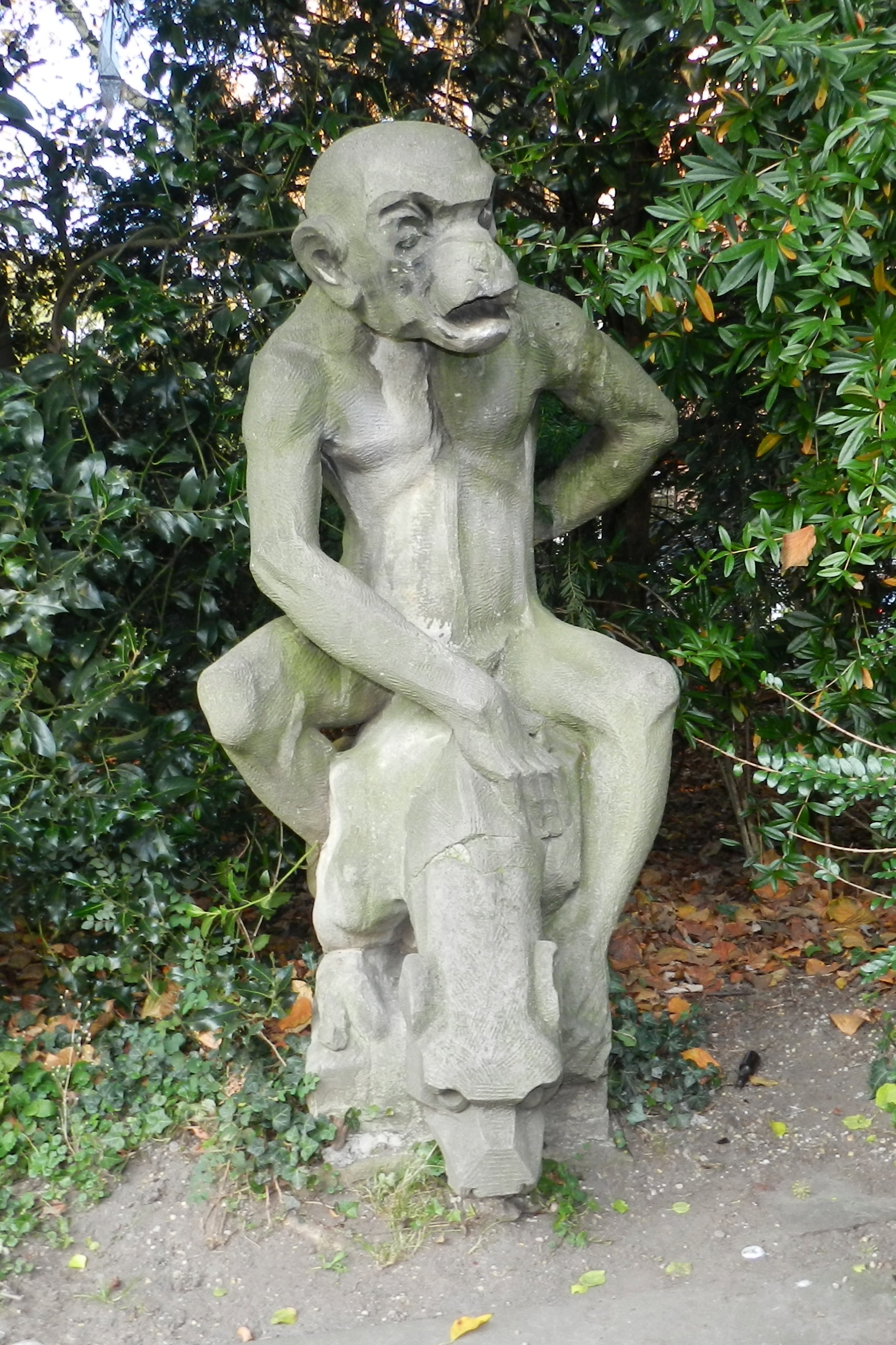 Sandstein-Skulptur Affe von Johannes Knubel im Düsseldorfer Zoopark, 1905 gefertigt und dem Löbbecke-Museum 1953 von Arthur Hauth als Geschenk überlassen.